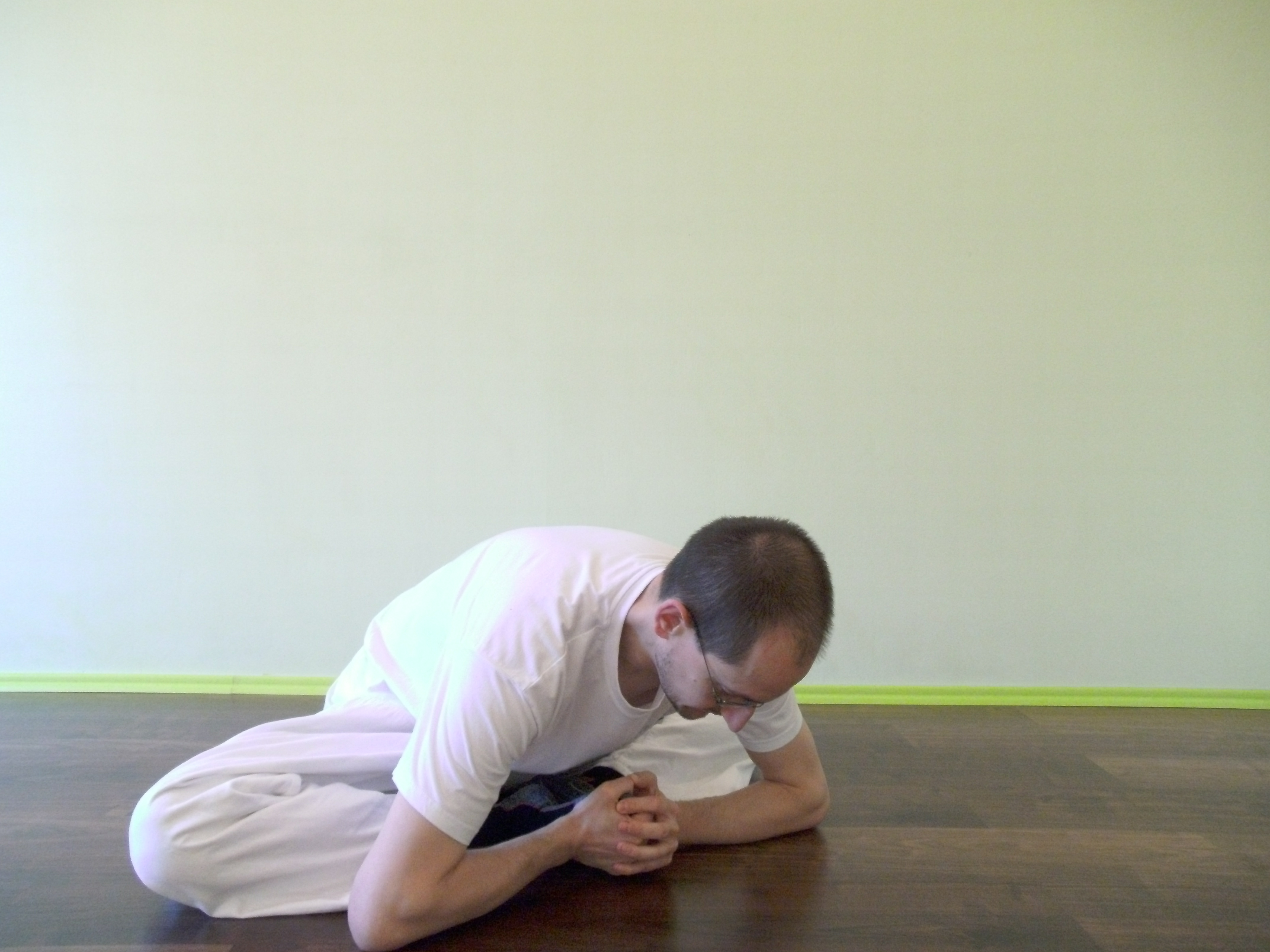 Makko Ho Übung für Herz- und Dünndarmmeridian